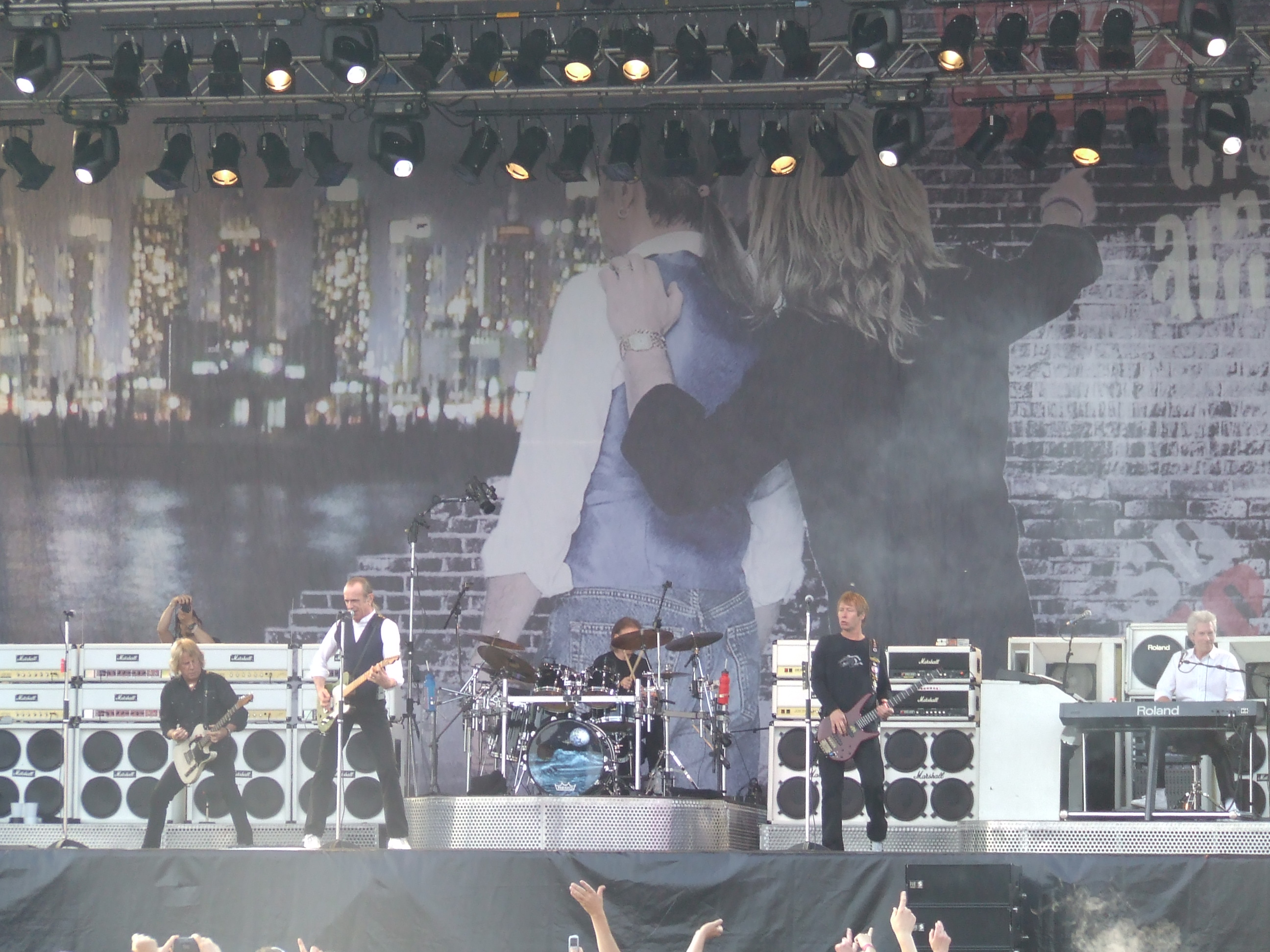 Dit is een zelfgemaakte opname, gefotografeerd op 9 juni 2006 op het Arrow Rock festival 2006 in Lichtenvoorde. De gebruikte camera is een Fuji s5600. Paulus_2 12 jun 2006 11:28 (CEST)